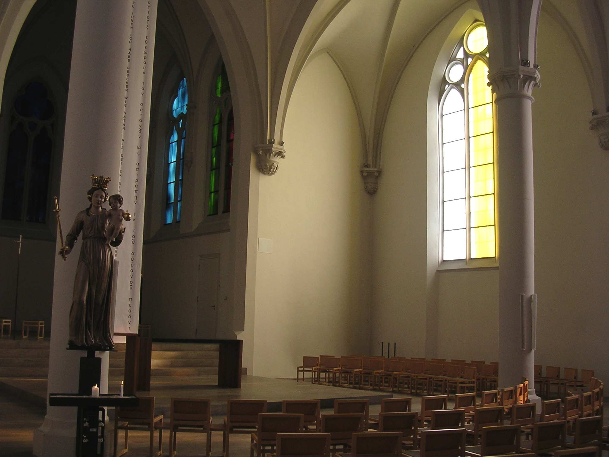 Maria Geburt Schweinheim (Innenansicht Februar 2009)